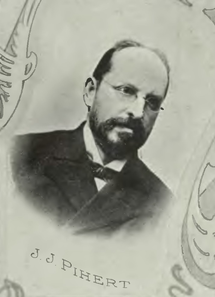 Portrét – Josef J. Pihert (1845-1911), Český hudební skladatel.